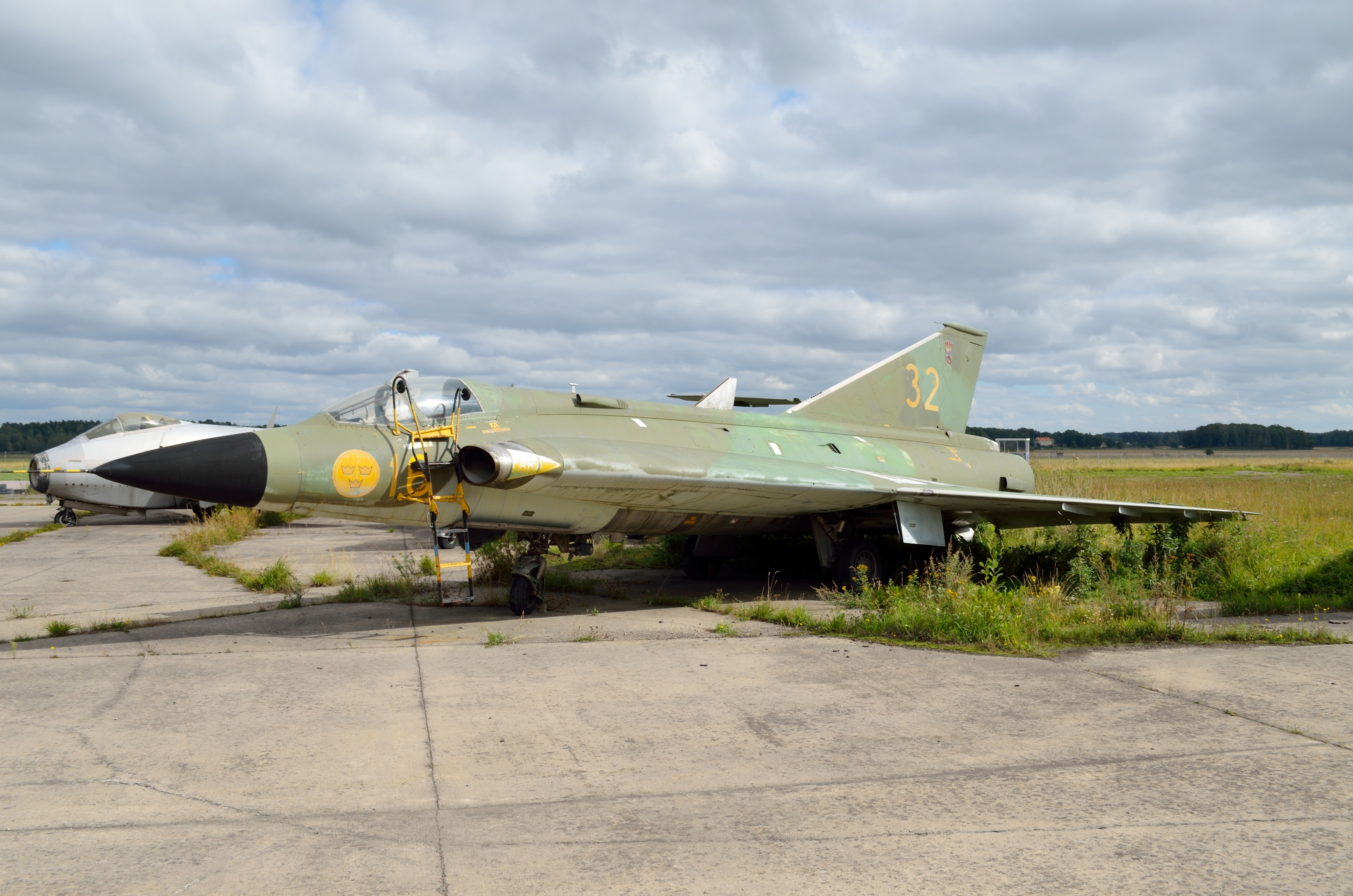 Saab J 35F-1 vid Västerås flygmuseum. Individen (35496) godkändes den 23 oktober 1967, och tjänstgjorde till en början vid F 13, och senare som F 1-16, F 1-29, F 10-53 och sist som F 16-32. Flygplanet togs ur tjänst efter en hög gångtid på 2.262 timmar, och överfördes till FTC i Västerås.